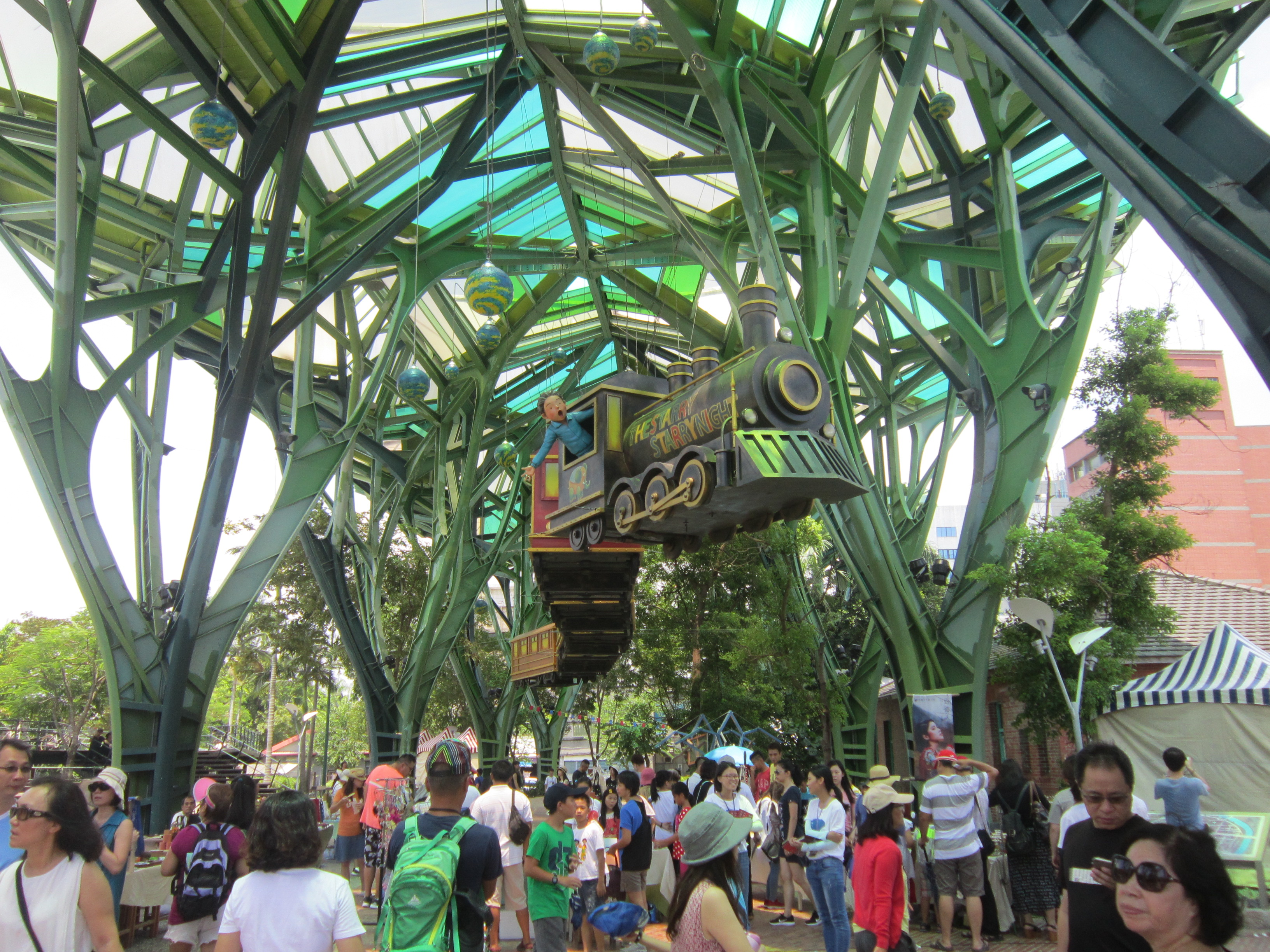 宜蘭火車站前的丟丟銅森林廣場